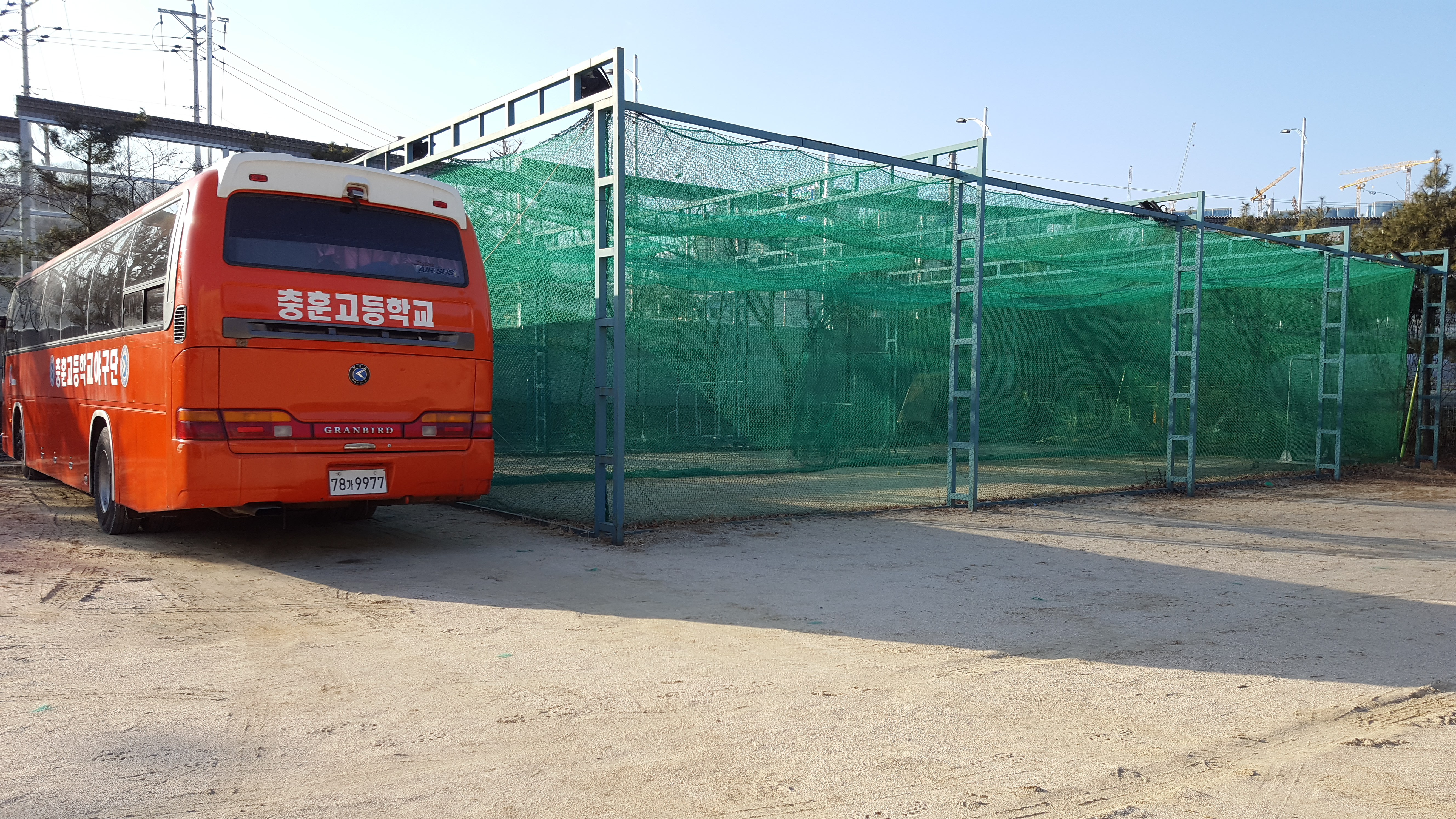 충훈고등학교 야구부 버스와 야구장